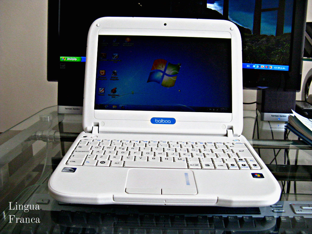 balboa laptop windows 7 profesional